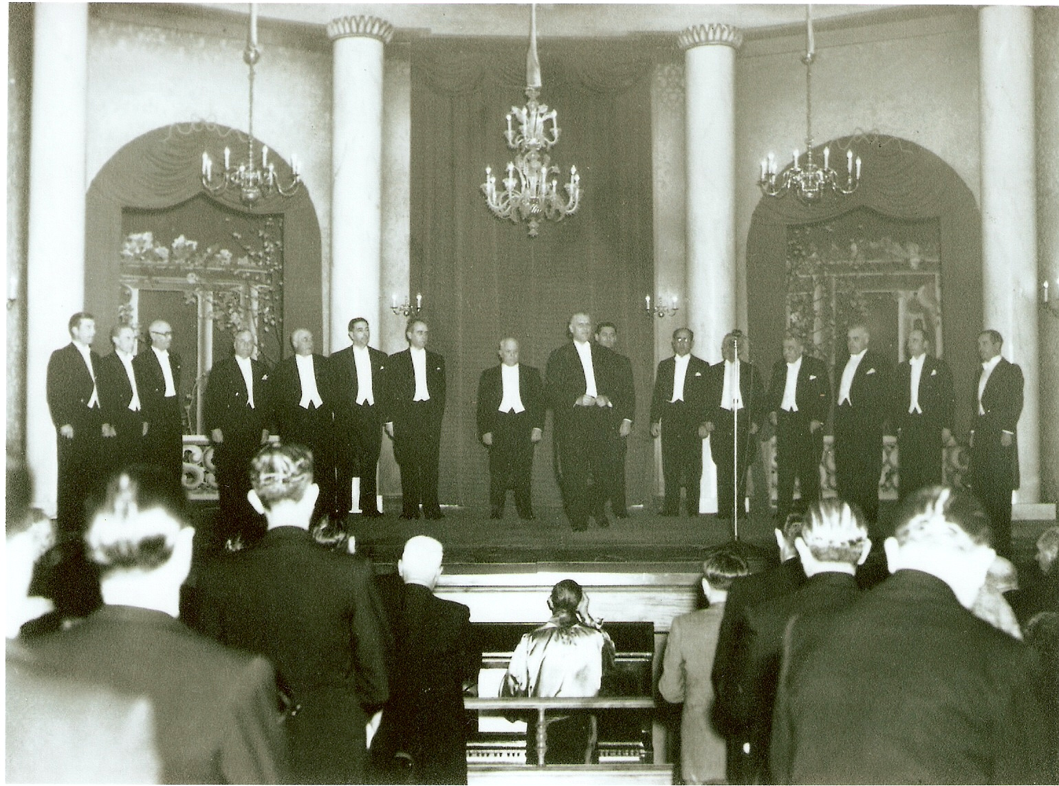 Inauguração do Teatro Micaelense: discurso de Francisco Luís Tavares